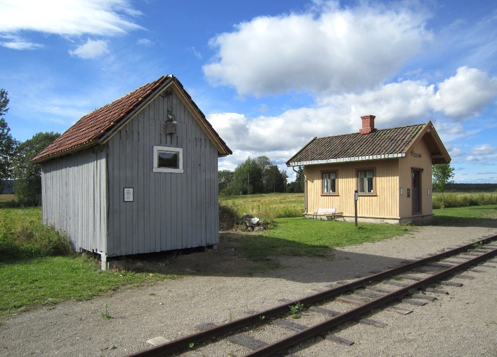 Fossum stasjon på museumsjernbanen Tertitten